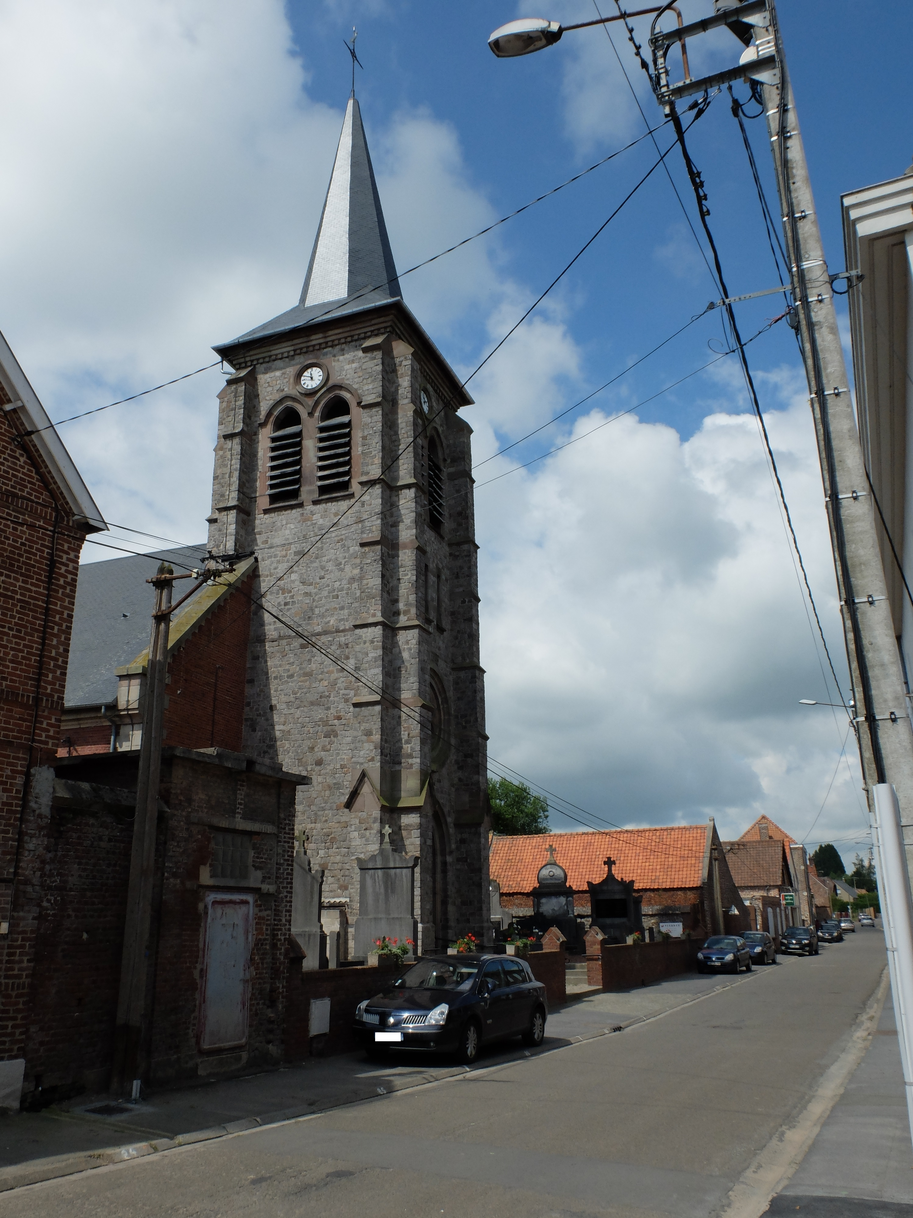 Vue de l'église d'Estrées, dans le Nord.